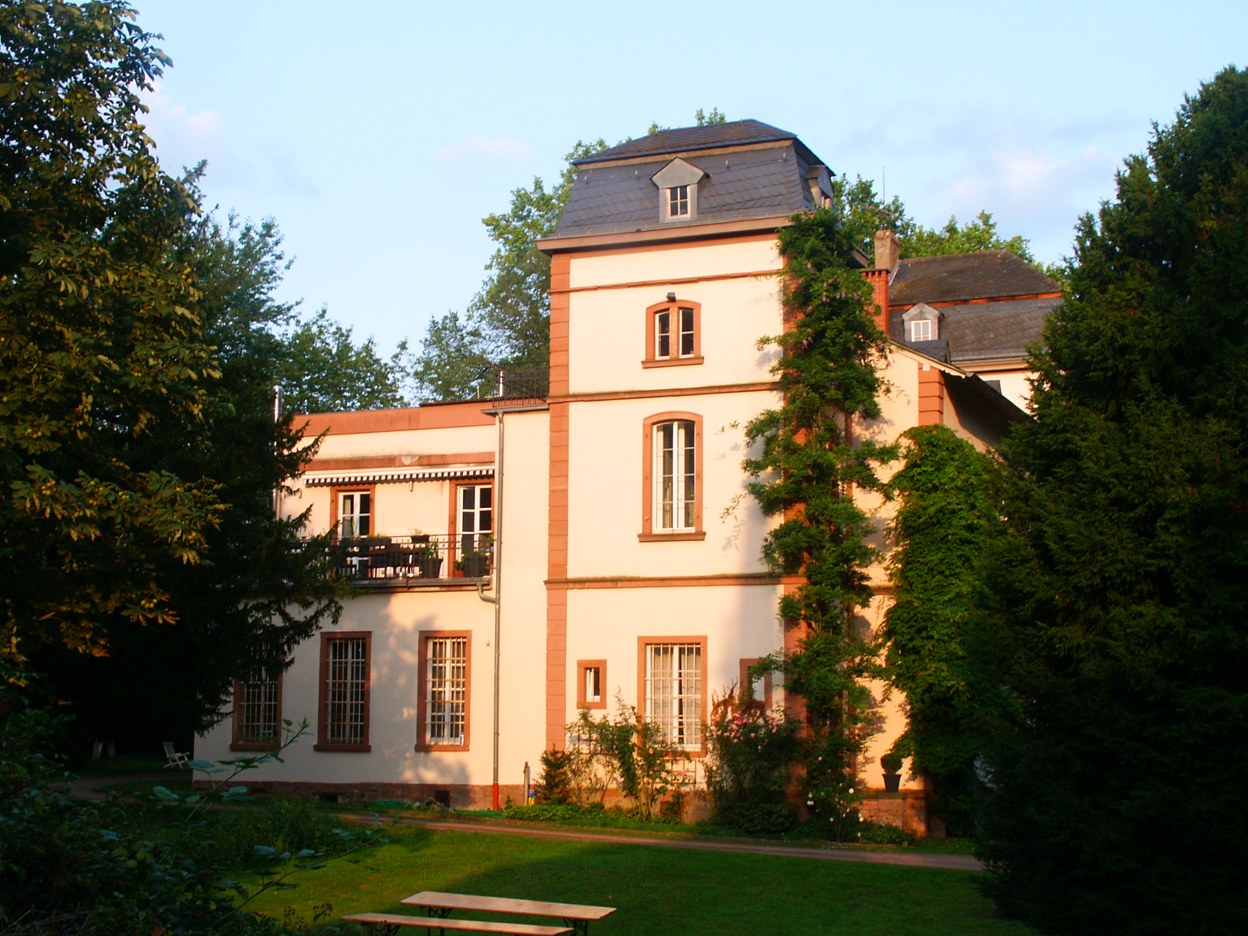 Schloss im Hof Trages